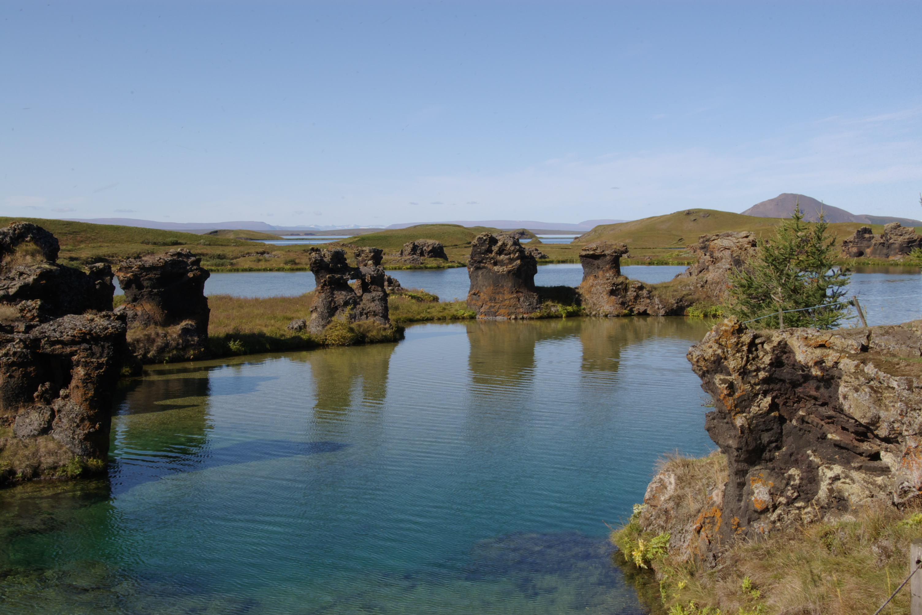 Mývatn from Höfdi nature park